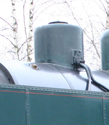 Hiekkakupu höyryveturissa